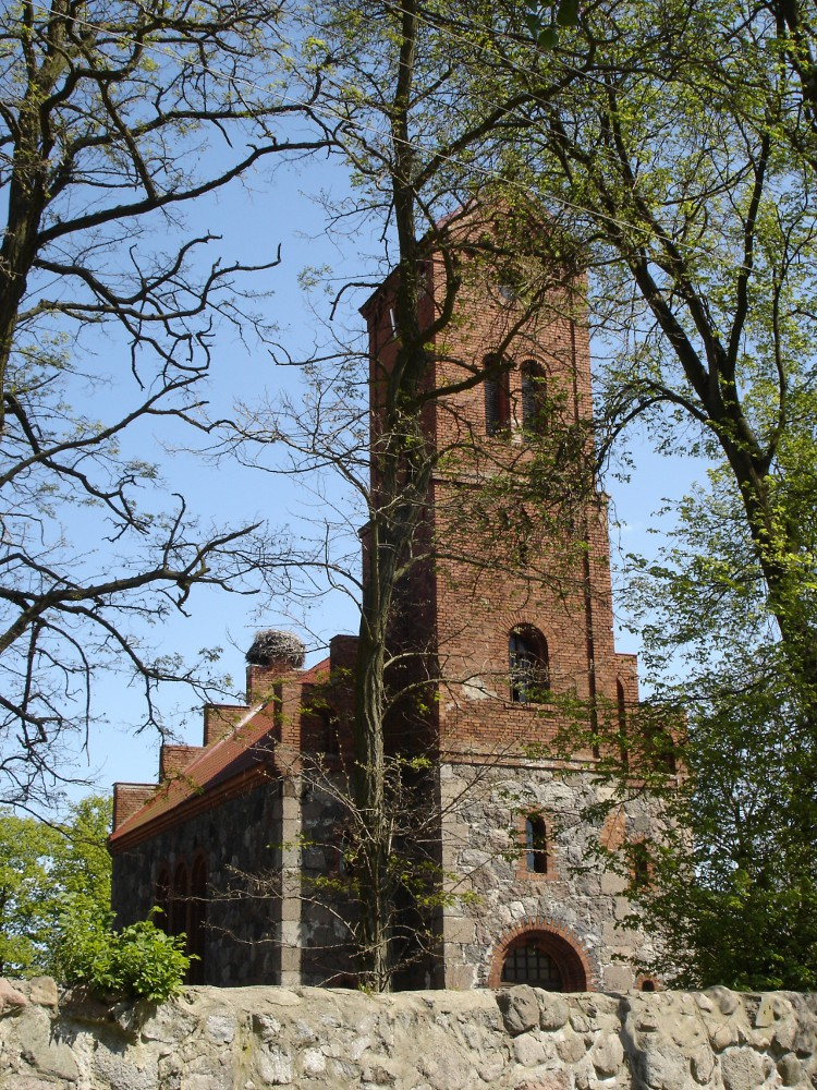 Żarowo - kościół granitowy w stylu neoromańskim, dawny protestancki, obecnie katolicki p.w. Najświętszego Serca Pana Jezusa (1856-1860)